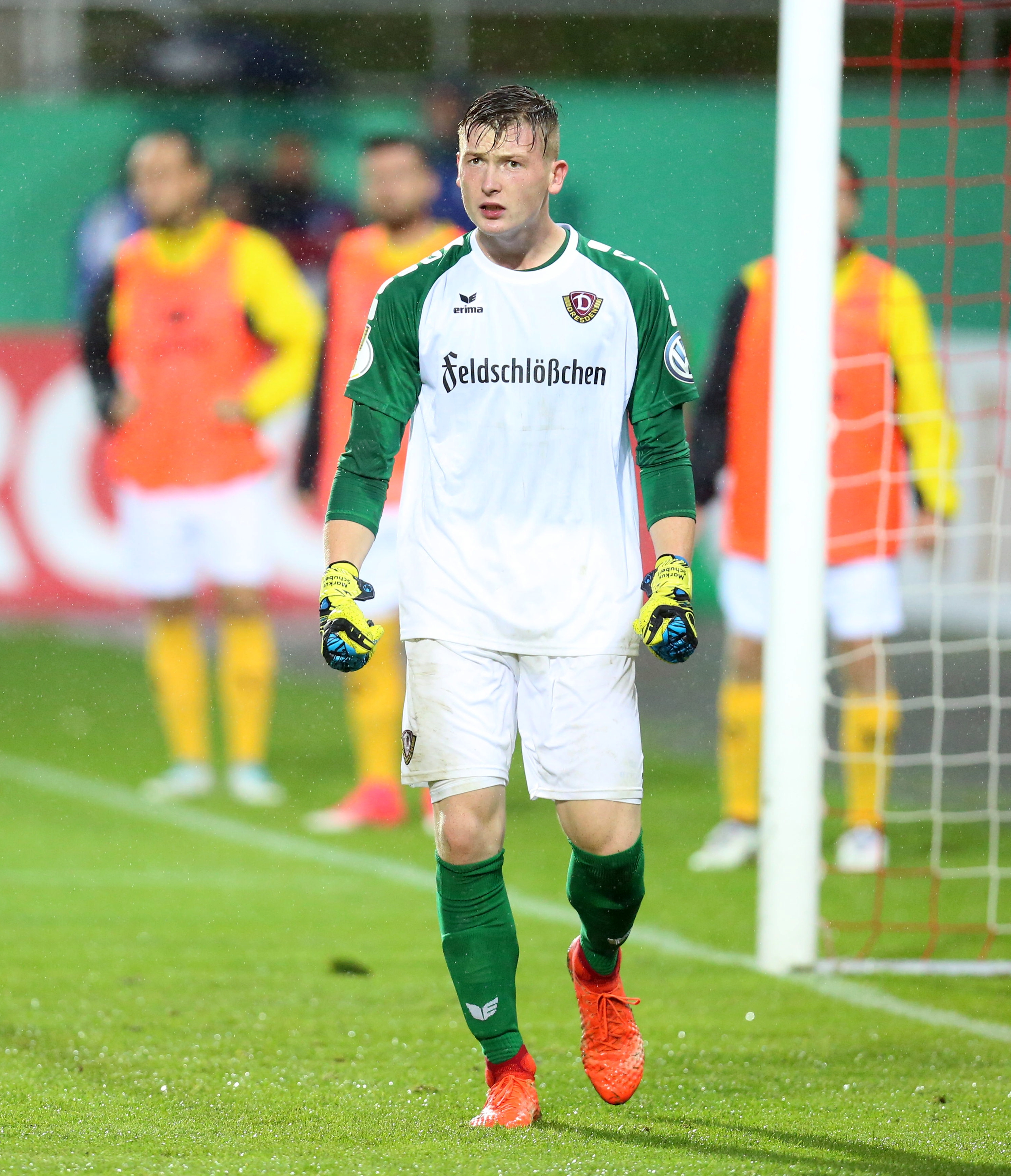 DFB-Pokal 2017/18, 1. Hauptrunde, TuS Koblenz gegen SG Dynamo Dresden: Markus Schubert (SG Dynamo Dresden)